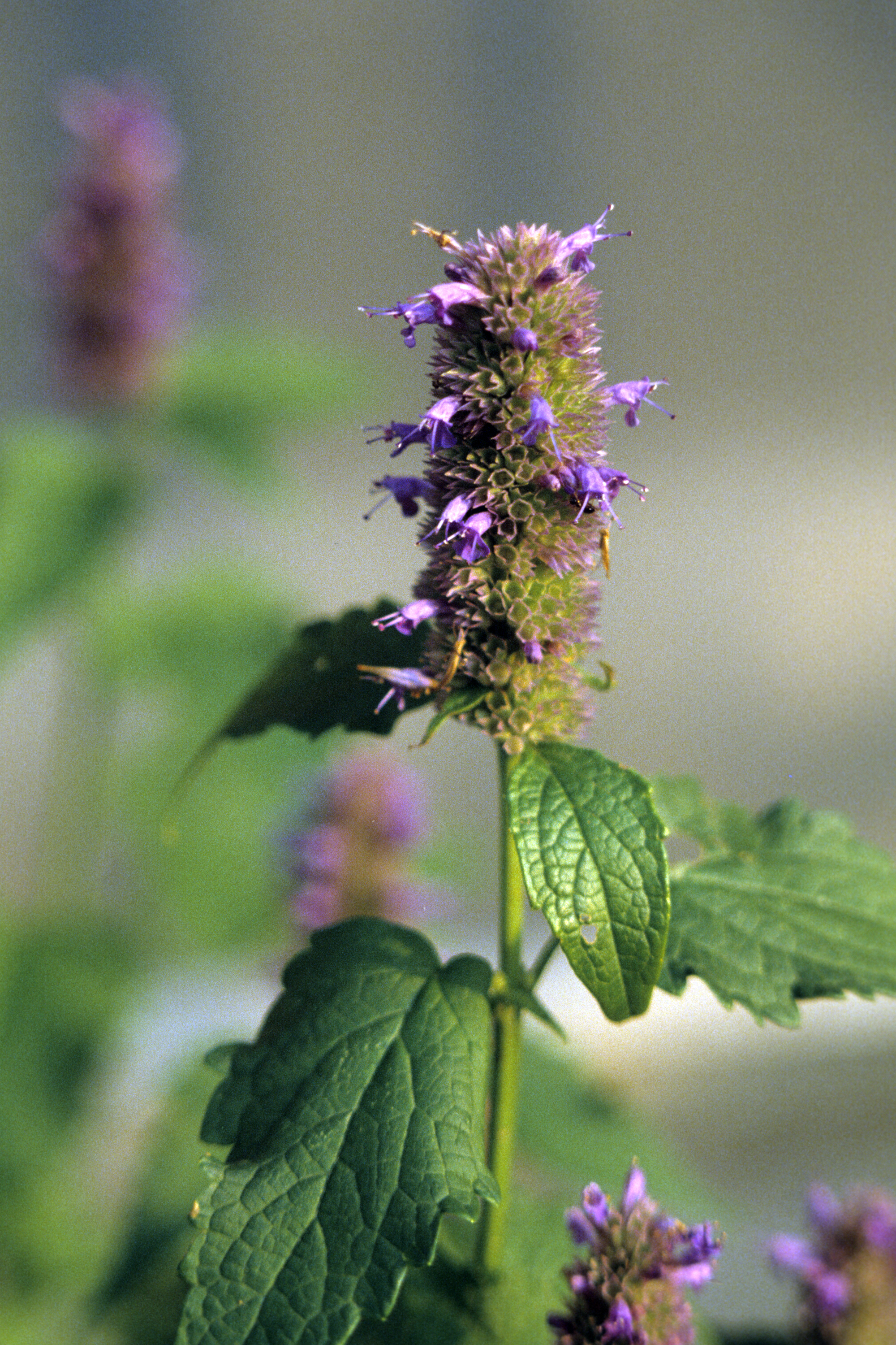 Agastache foeniculum